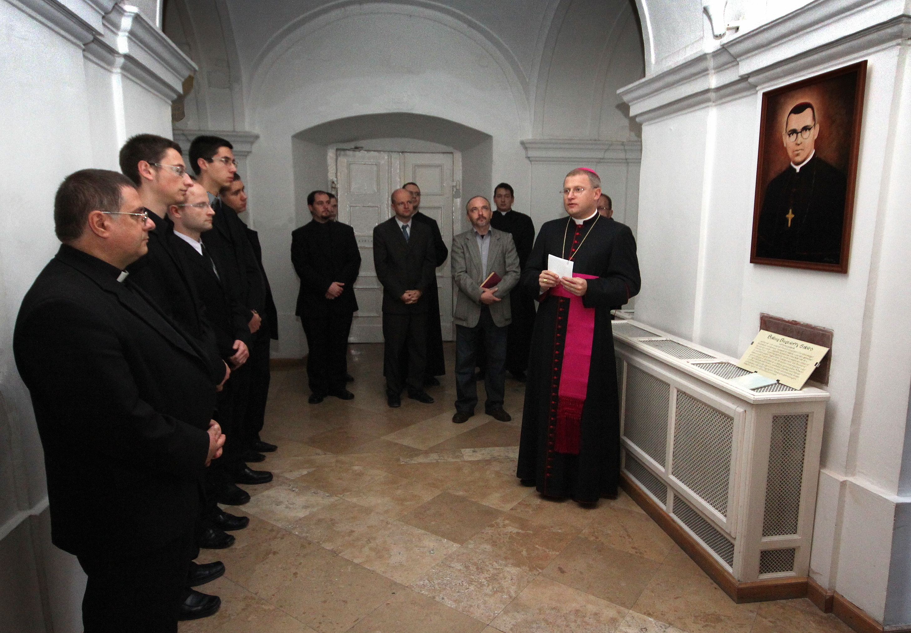 A 2010-ben boldoggá avatott vértanú nagyváradi püspök, Bogdánffy Szilárd emlékére kiállítást készített Emődi András, a nagyváradi római katolikus püspökség levéltárosa. A budapesti Központi Papnevelő Intézetben, Bogdánffy püspök teológiai tanulmányainak helyszínén Böcskei László nagyváradi megyéspüspök nyitotta meg a kiállítást 2011. október 19-én.